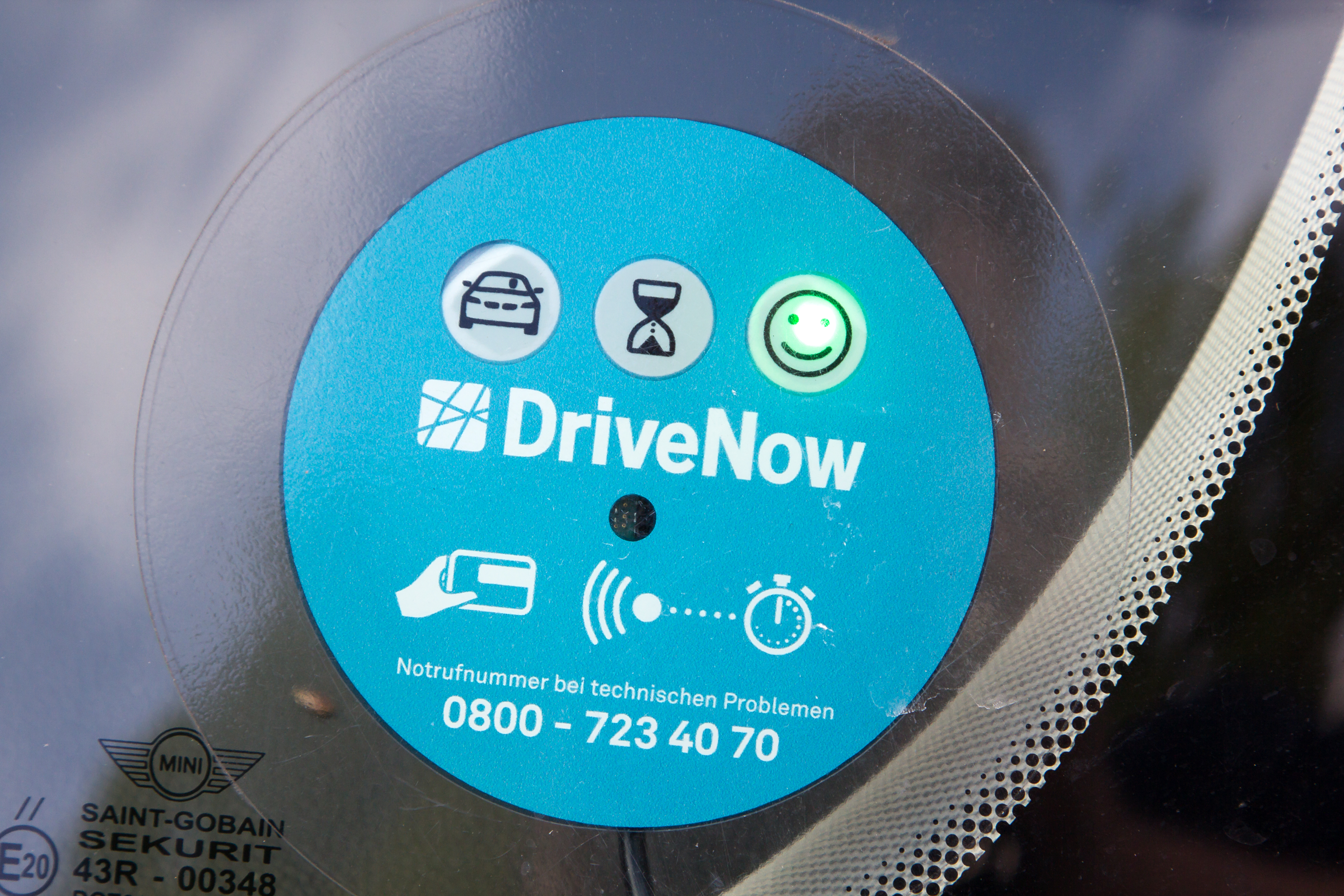 Kartenleser mit LED-Anzeige an der Windschutzscheibe eines DriveNow-Mini